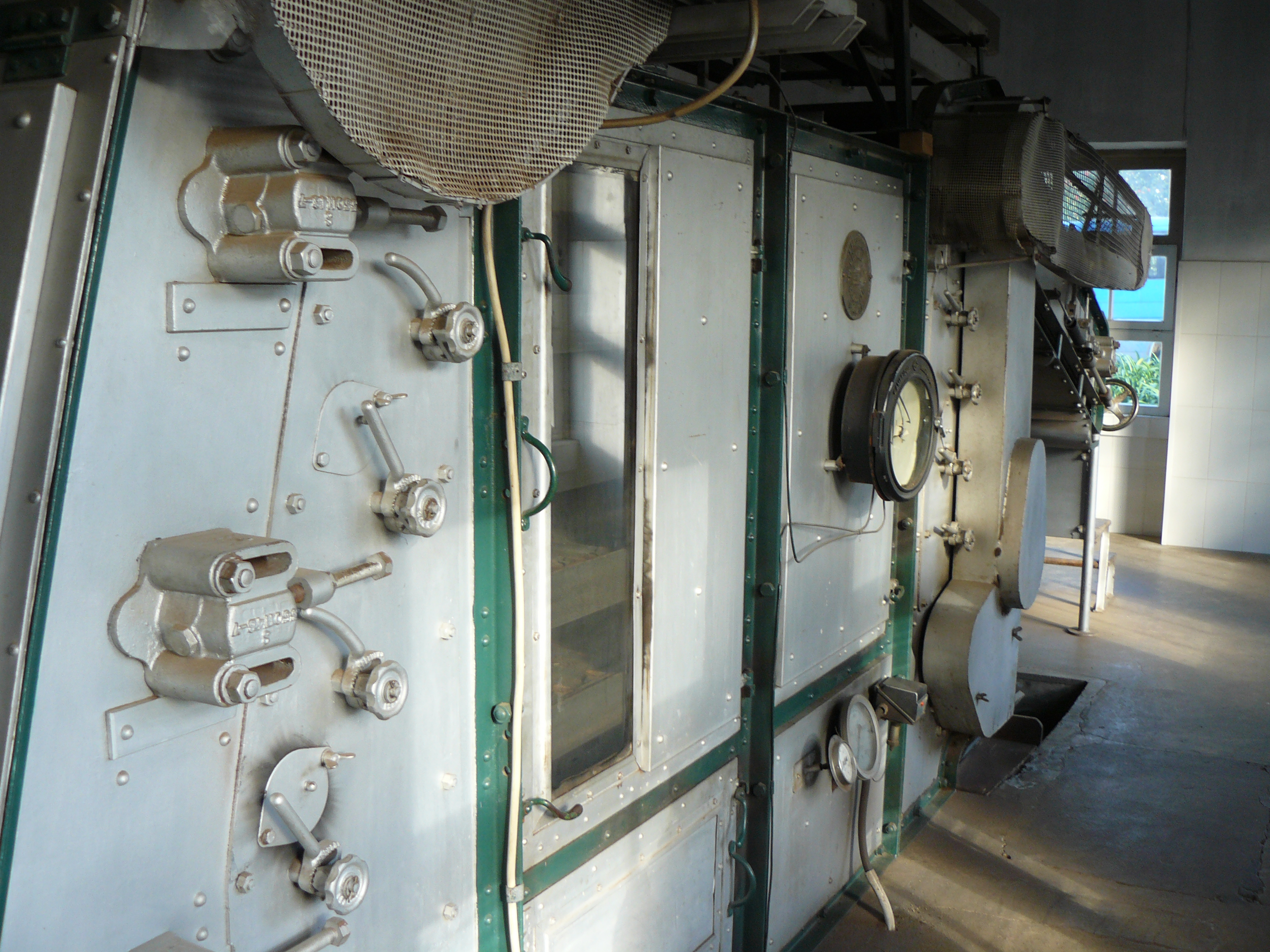 Diese historische, noch in Benutzung, Teetrockenmaschiene für das 'Feuern' von Tee, steht in einer Teefabrik auf São Miguel, Azoren.